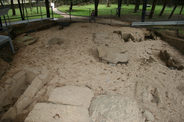 Yacimiento arqueológico visigodo, s. VII, de Remedios, Comenar Viejo, Madrid, España.